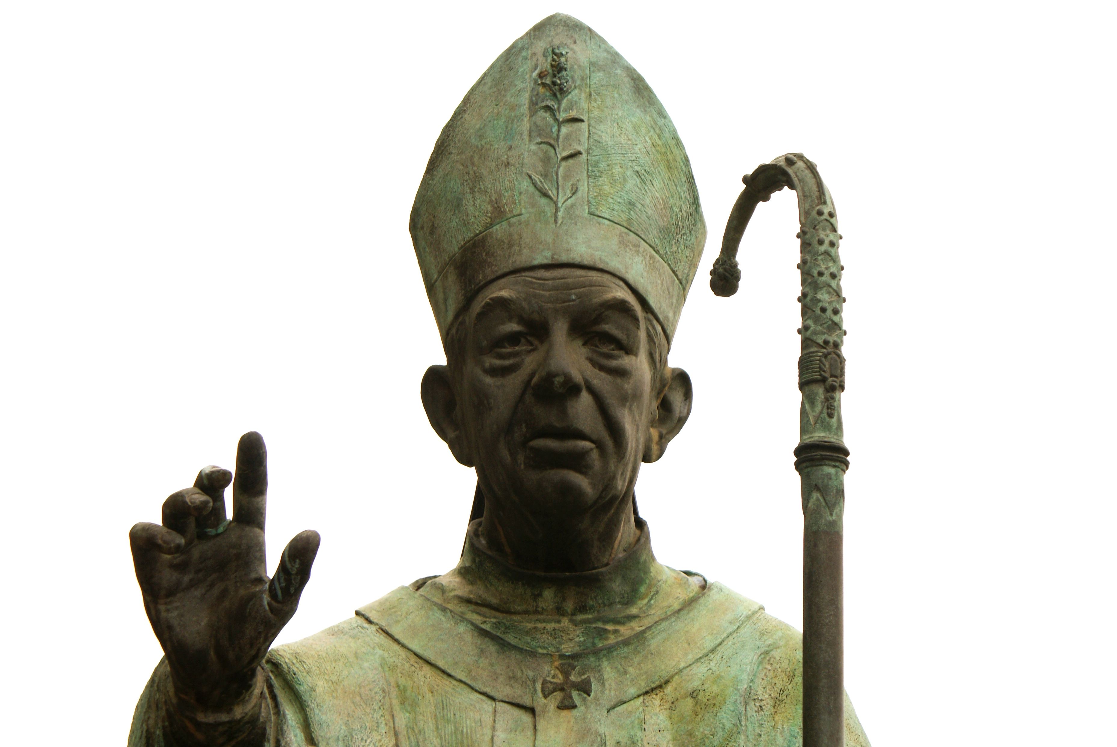 Estatua al Cardenal Tarancón en Villarreal (Castellón, España)